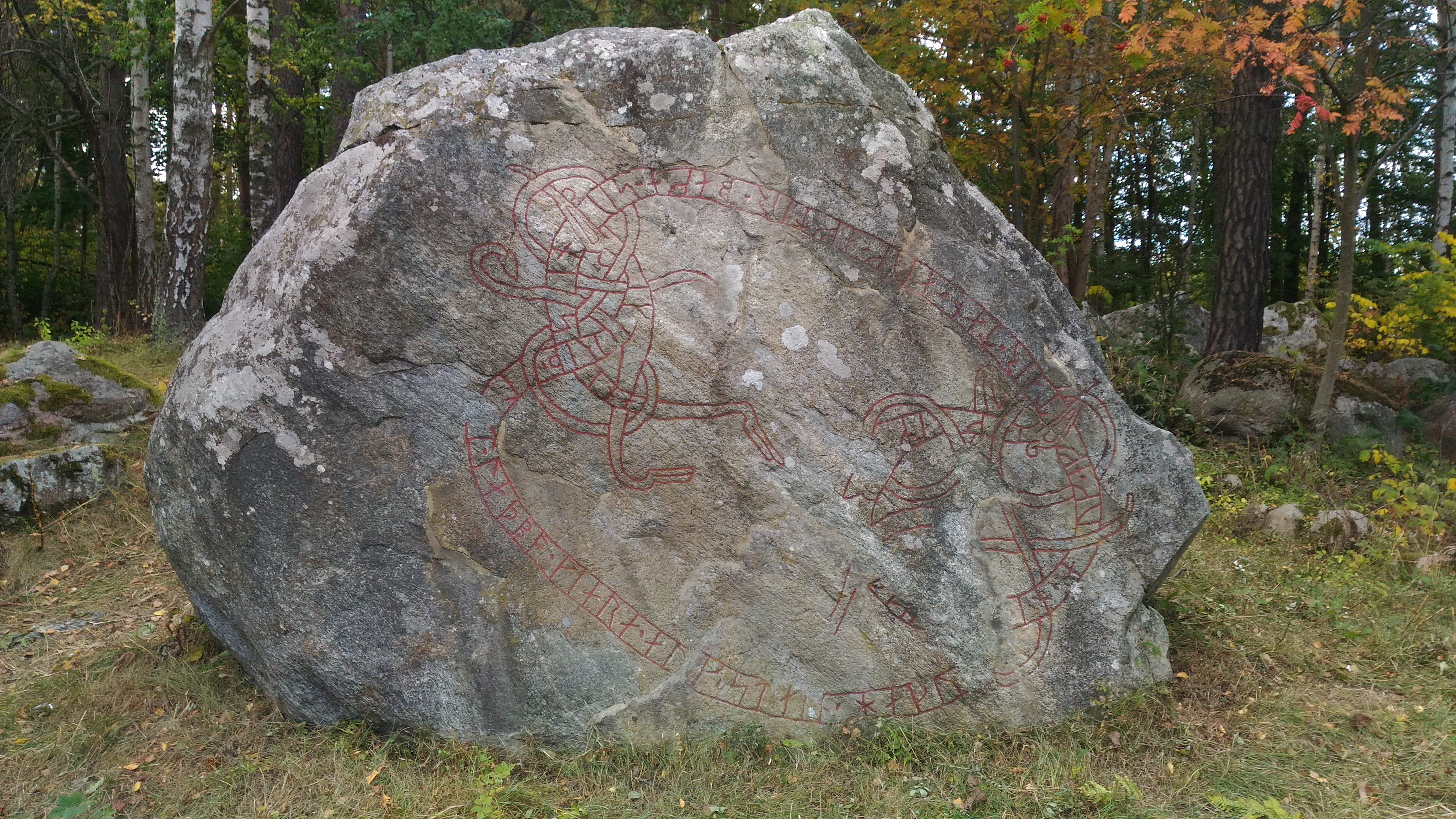 Upplands runskrifter 114 - Runristningar från 1000-talet i Upplands Väsby.